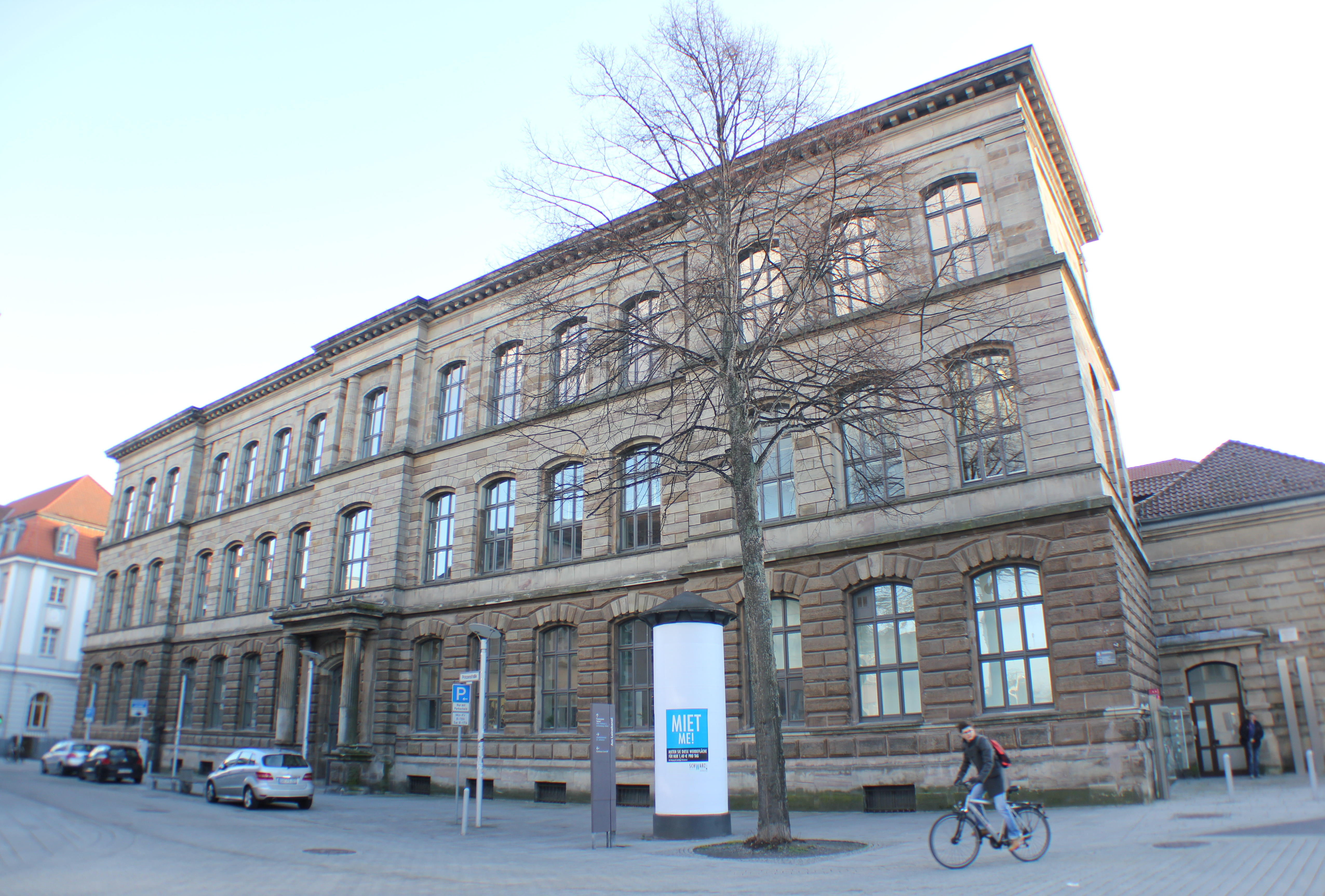 Niedersächsische Staats- und Universitätsbibliothek Göttingen (Altbau)